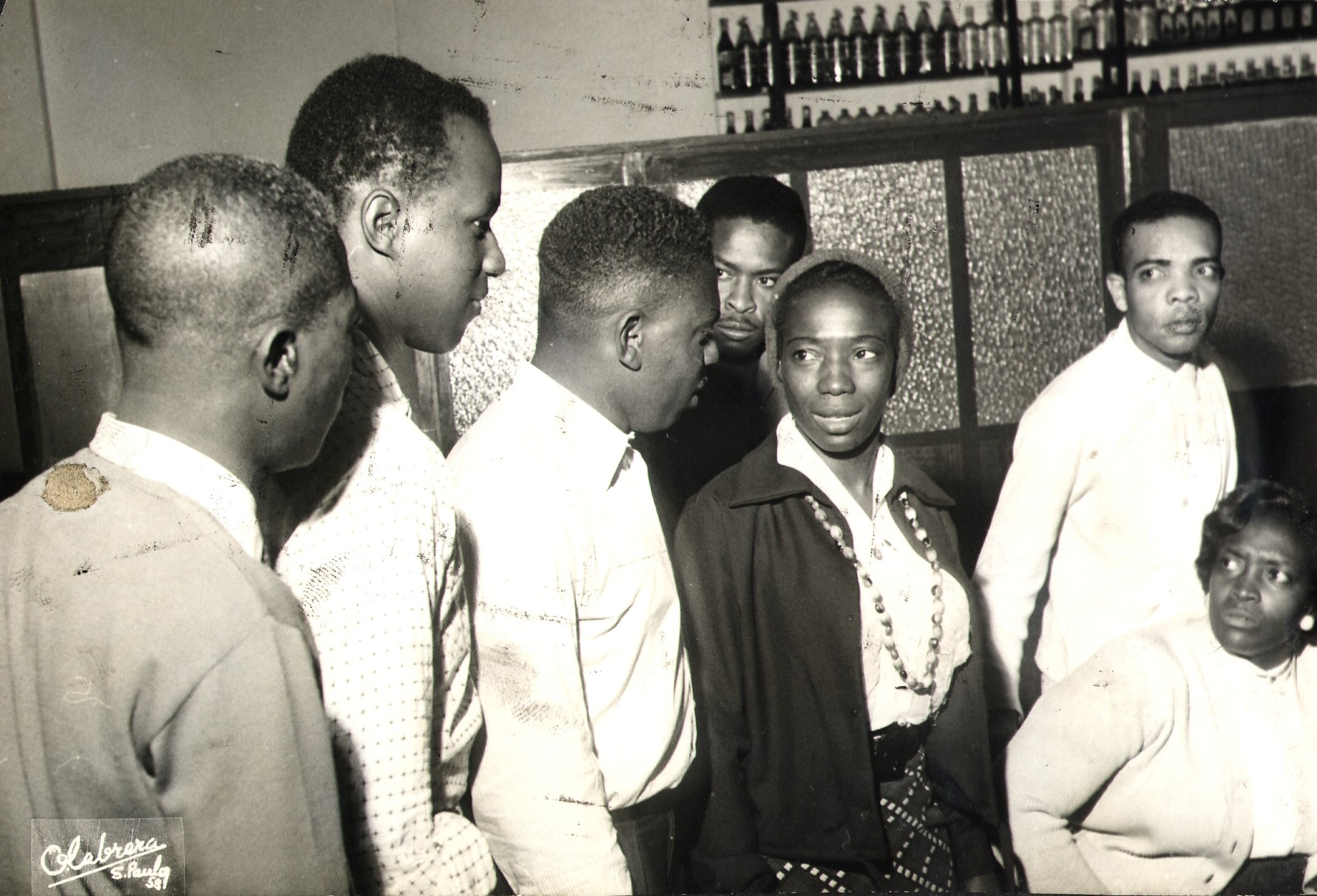 Fotografia do Fundo Correio da Manhã, sob a guarda do Arquivo Nacional.